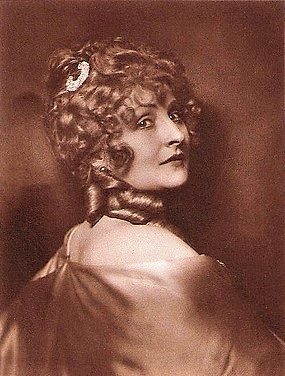 Lu Synd